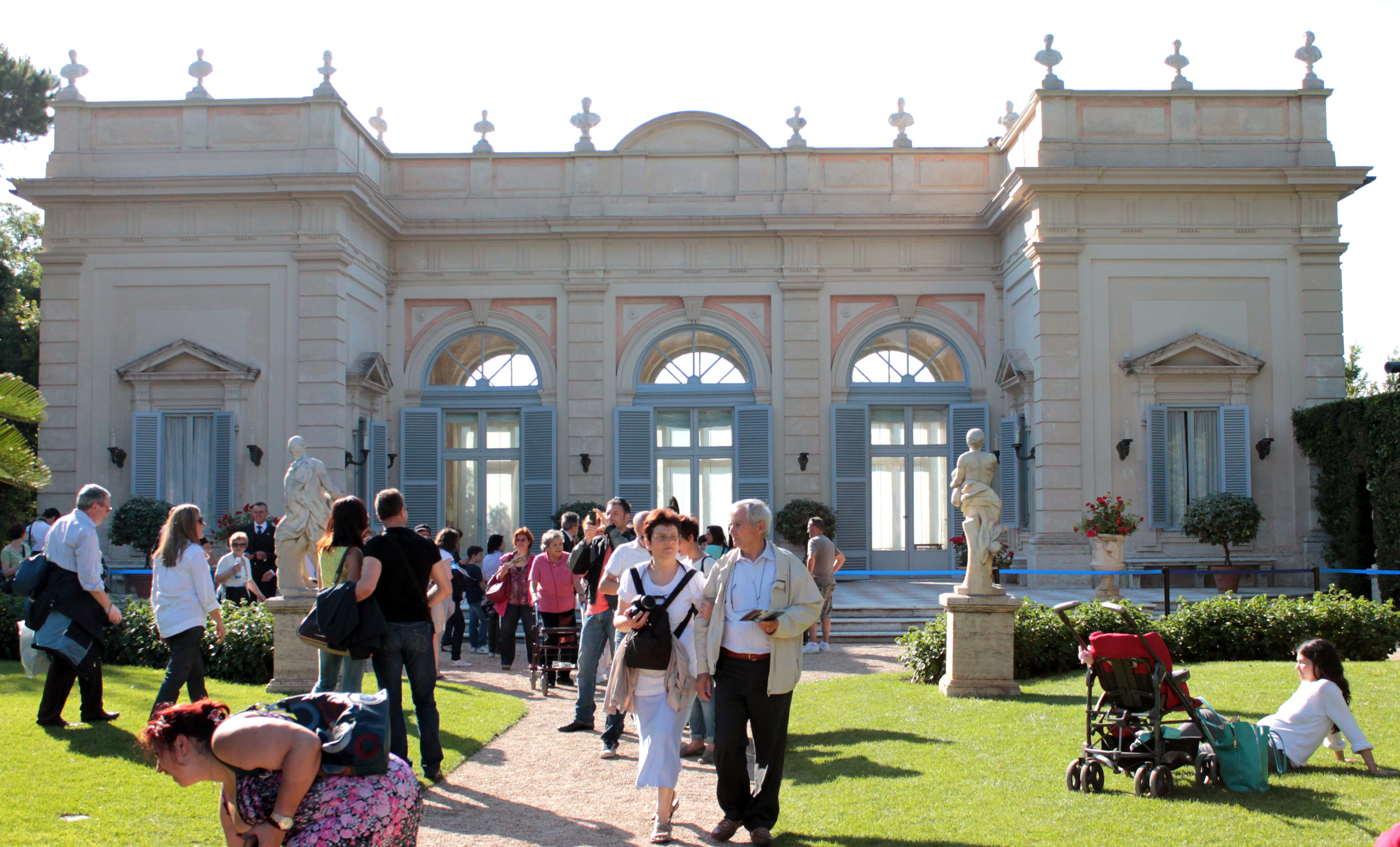 I giardini del Quirinale... - The gardens of the Quirinal... Ho fatto una strana scoperta. Ogni volta che parlo con un sapiente sono sicuro che la felicità non è possibile. Eppure, quando parlo con il mio giardiniere, io sono convinto del contrario. (Bertrand Russell)